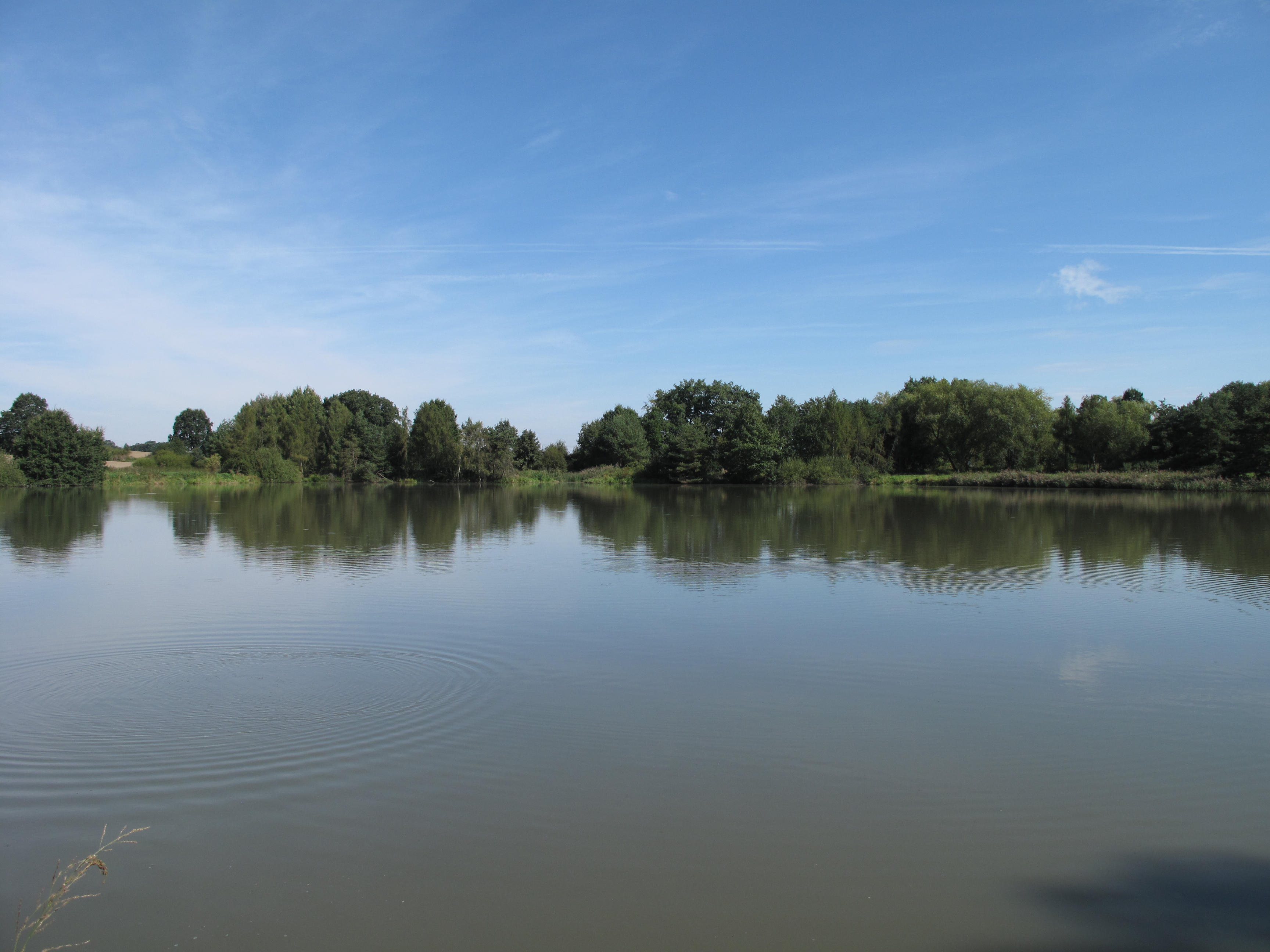 Netušil. Okres Písek, Česká republika.